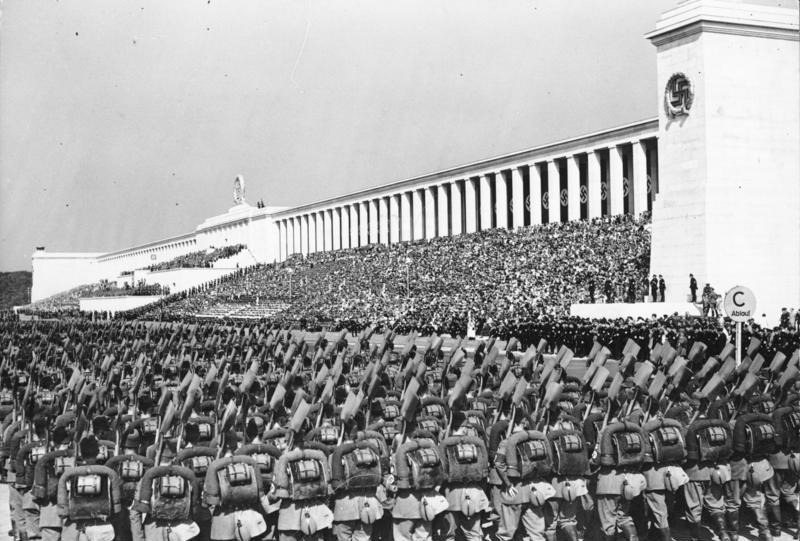 Nürnberg, Reichsparteitag, RAD-Parade Reichsparteitag 1937. Der große Appell des Reichsarbeitsdienstes auf der Zeppelinwiese.- Während des Vorbeimarsches der 38000 Arbeitsdienstmänner.